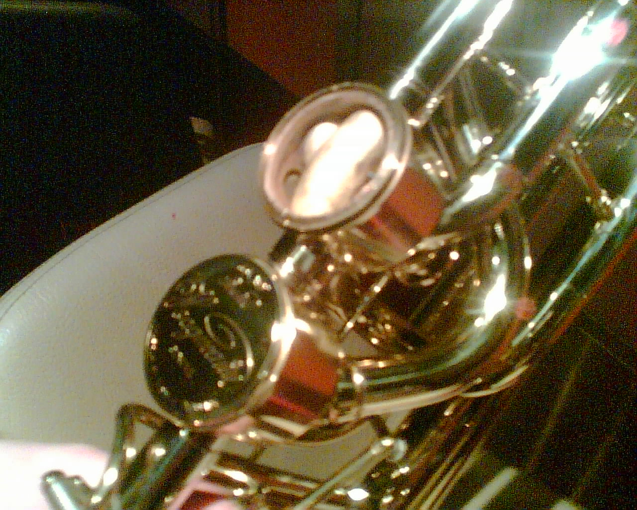 Dual independent Hagmann valves on bass trombone